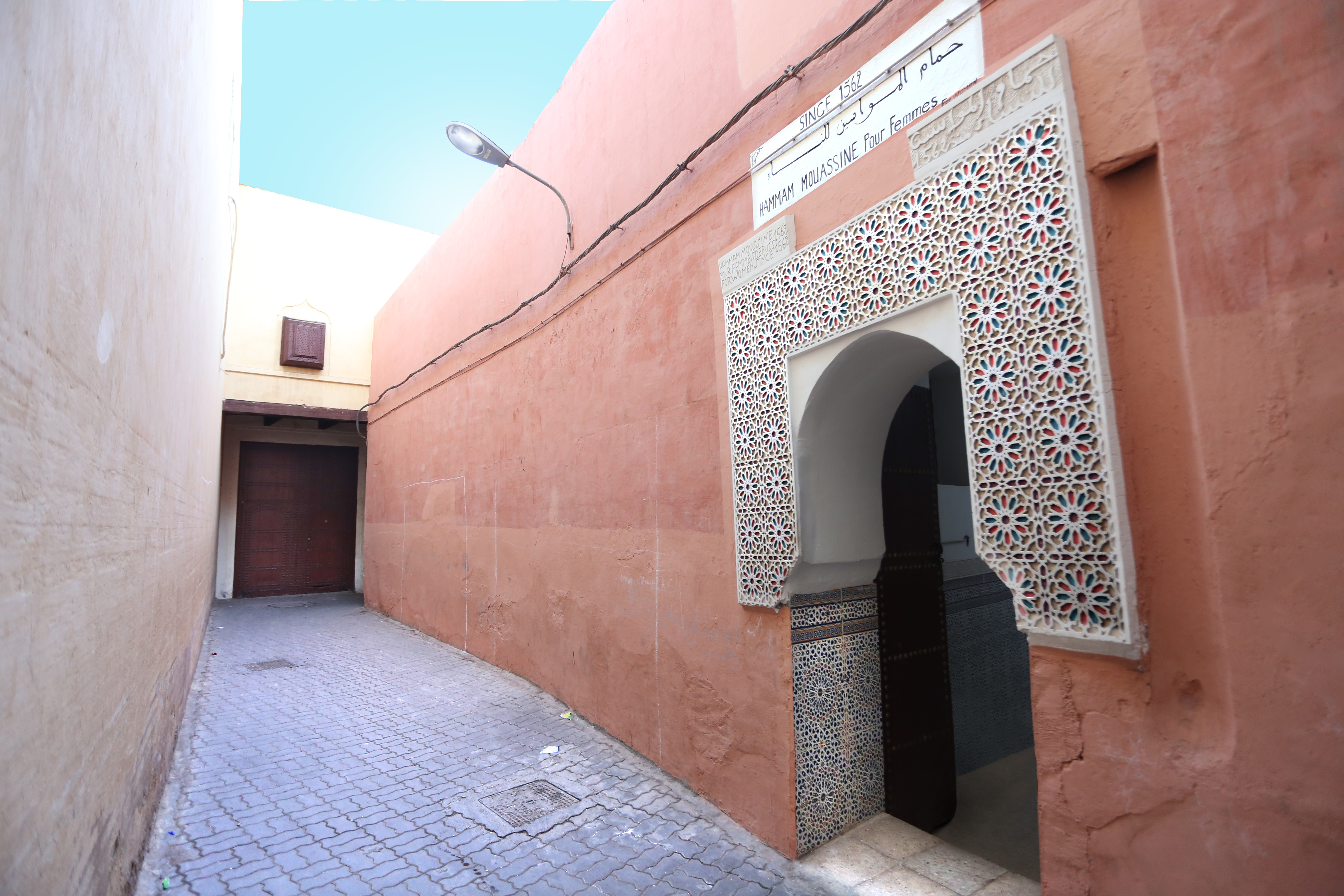 hammam mouassine, côté femmes